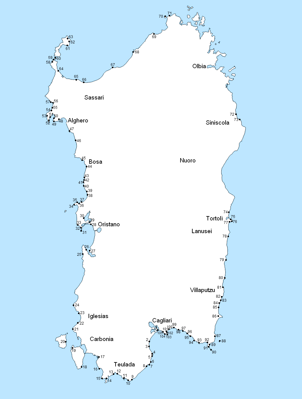 Cartina della Sardegna con la posizione delle torri costiere.